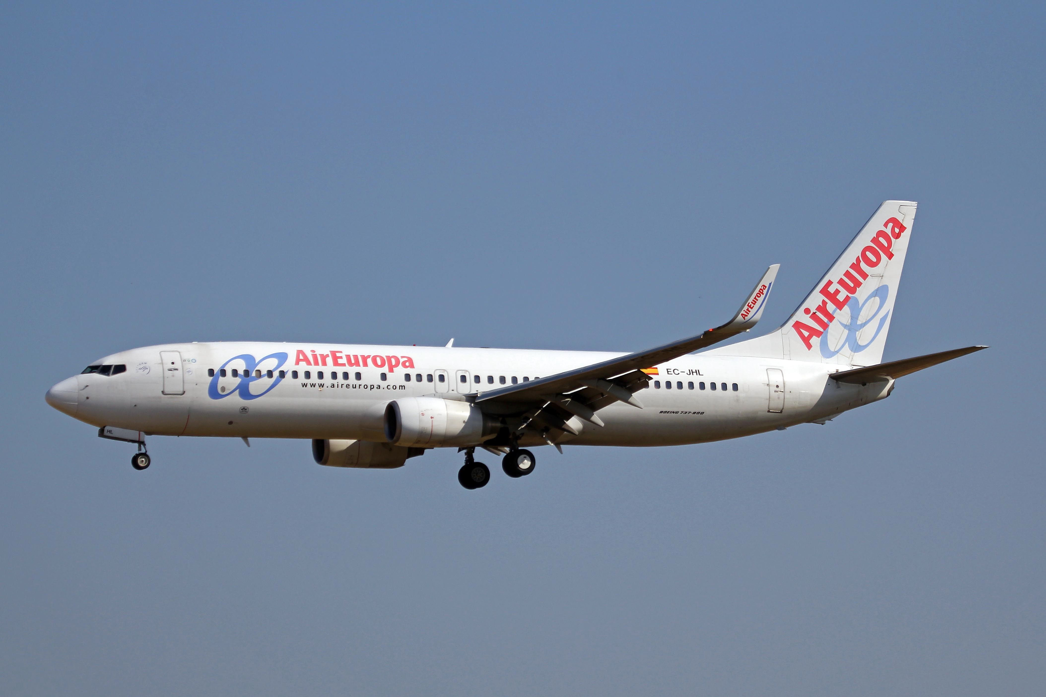 Avió d'Air Europa a l'aeroport de Palma.